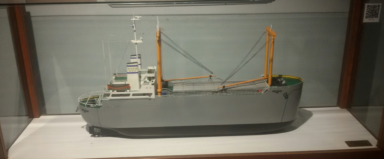 דגם אניית חיל הים בת גלים 2 שהוכן על ידי האמן ואיש צוות ערן בכר מוצב במוזיאון ההעפלה וחיל הים22 ביוני 2017